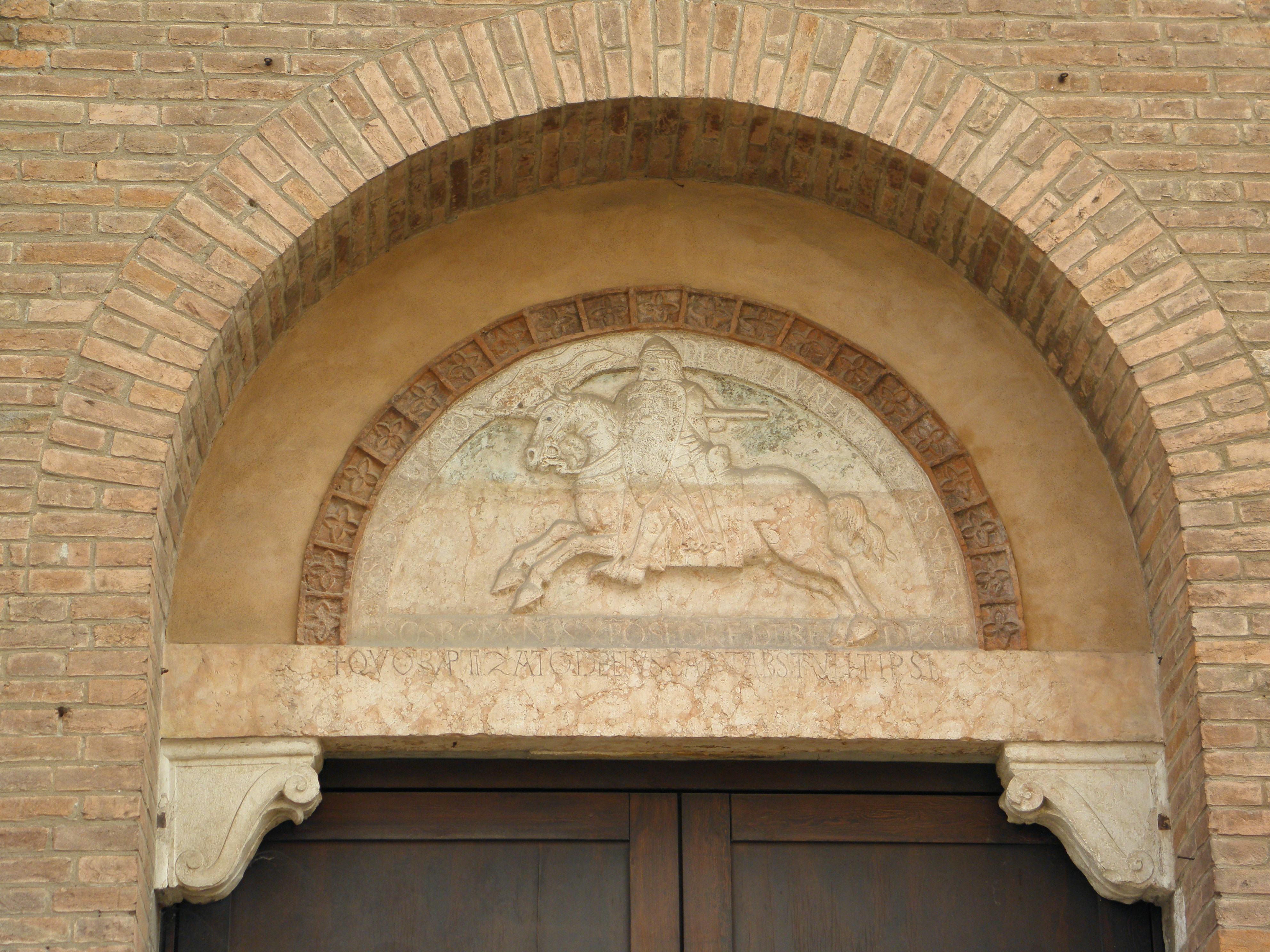 Ferrara, la lunetta posta sopra il portale della chiesa sconsacrata di San Romano, ora parte dello spazio espositivo del Museo della Cattedrale.